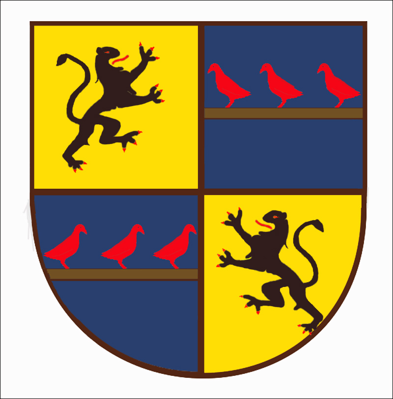 Wappen einer unehelichen Seitenlinie der adeligen Familie von Reuschenberg zu Setterich um 1700